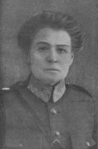 Ludwika Wysłouch Zawadzka